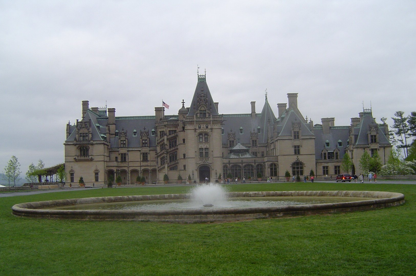 Biltmore Estate